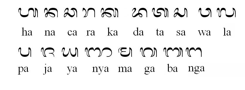 Gambar:Hanacaraka-bali.png